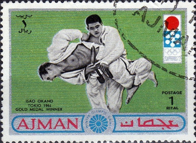 Isao Okano